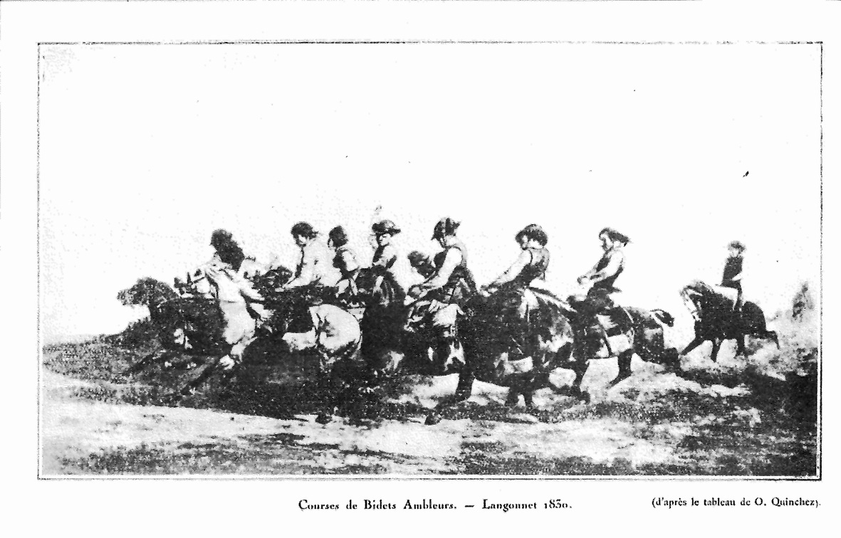 Courses de bidets ambleurs à Langonnet en 1844. Tableau d’Othon Quinchez reproduit sur une carte postale ancienne.